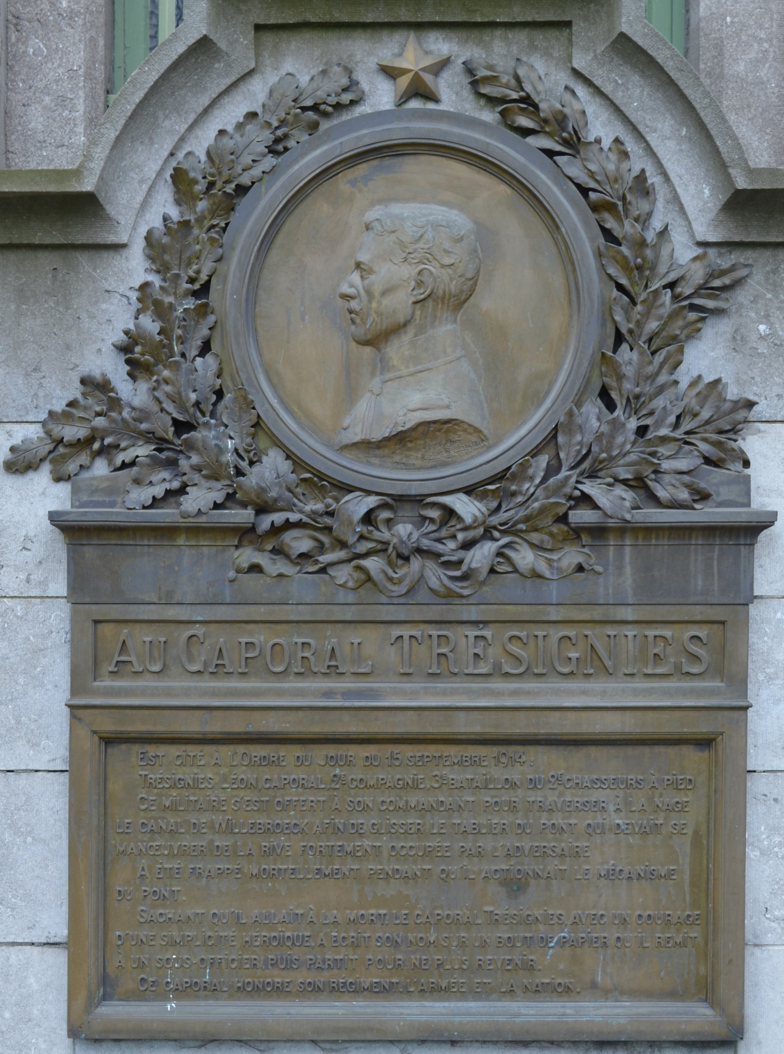 Plaque commémorative, œuvre d'Eugène de Bremaecker de 1920, placée à la droite de l'entrée de l'ancienne caserne d'infanterie "Caserne caporal Trésignies", avenue Général Michel à Charleroi (Belgique). Texte : Au Caporal Trésignies Est cité à l'Ordre du jour du 15 septembre 1914 : Trésignies Léon, caporal, 2e compagnie, 3e bataillon du 2e chasseurs à pied. Ce militaire s'est offert à son commandant pour traverser à la nage le canal de Willebroeck afin de glisser le tablier du pont qui devait se manœuvrer de la rive fortement occupée par l'adversaire. A été frappé mortellement pendant qu'il actionnait le mécanisme du pont. Sachant qu'il allait à la mort, le caporal Trésignies, avec un courage d'une simplicité héroïque, a écrit son nom sur un bout de papier qu'il remit à un sous-officier puis partit pour ne plus revenir. Ce caporal honore son régiment, l'armée et la nation.